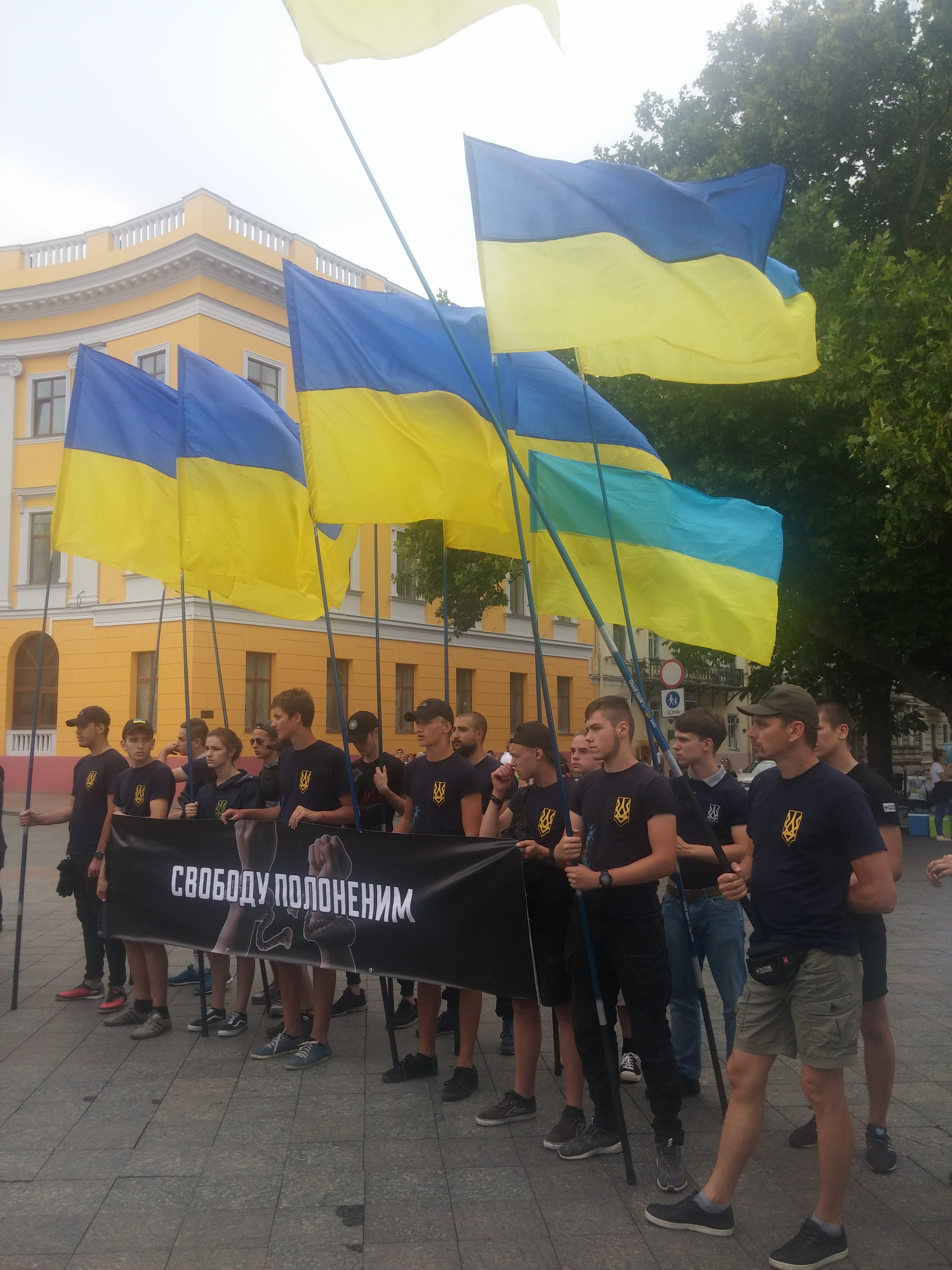 Manifestation organisée avec le mouvement Corps national (Національний корпус) à Odessa en juillet 2018.